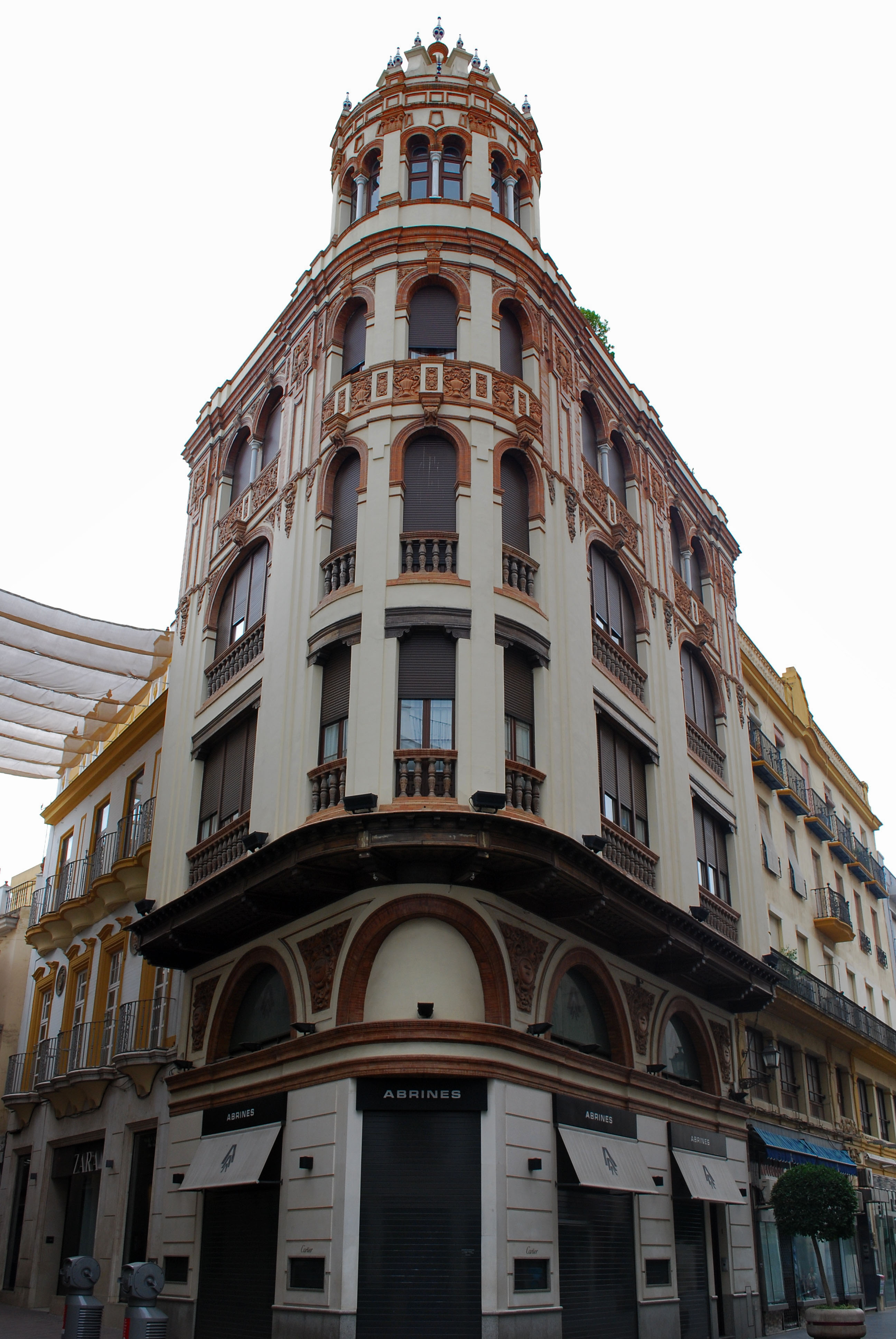 Edificio Casa Ocaña-Carrascosa en calle Tetuán de Sevilla, diseñado por el arquitecto Juan Talavera y Heredia